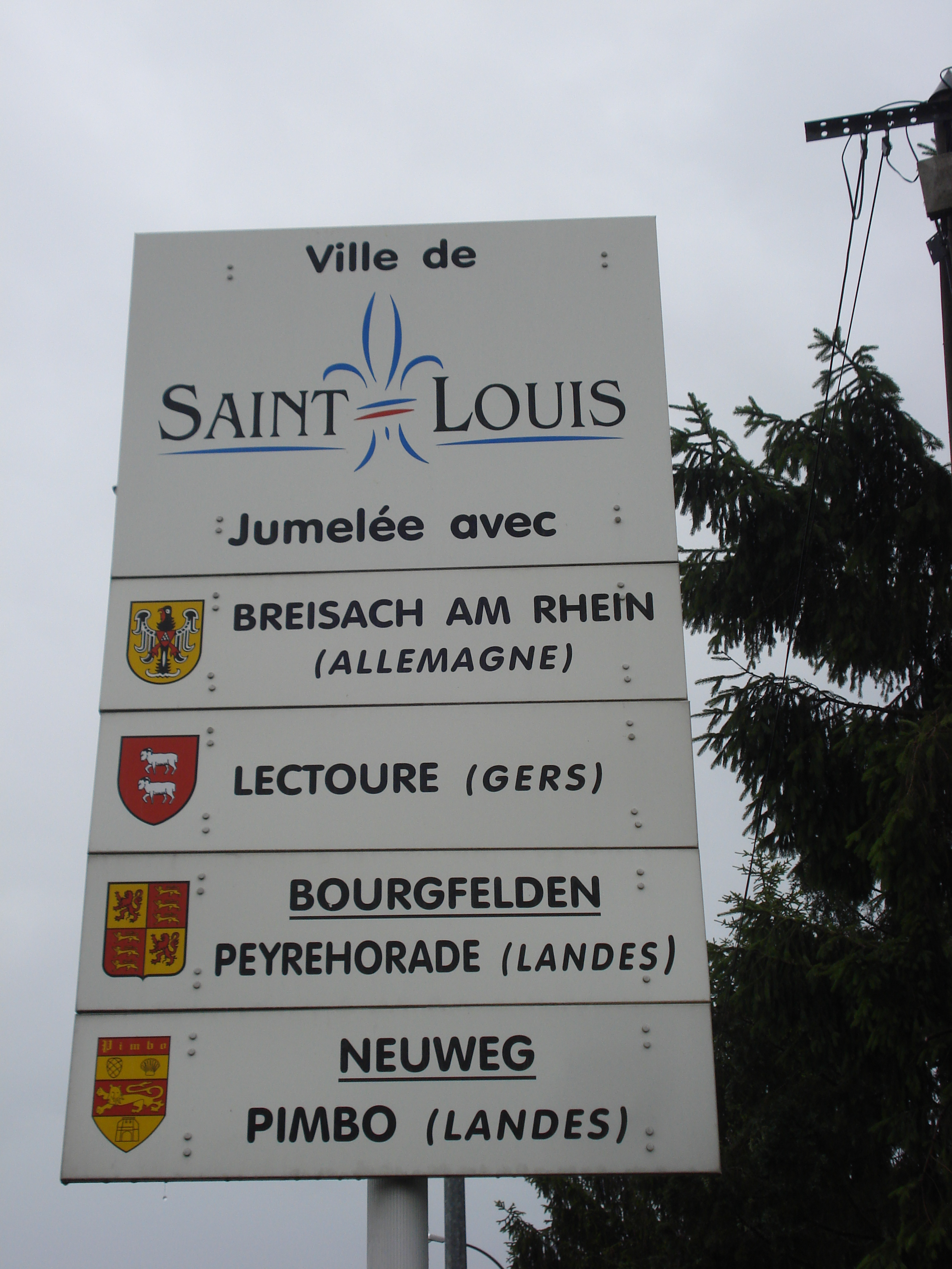 Panneau indiquant les villes jumelées à Saint-Louis.